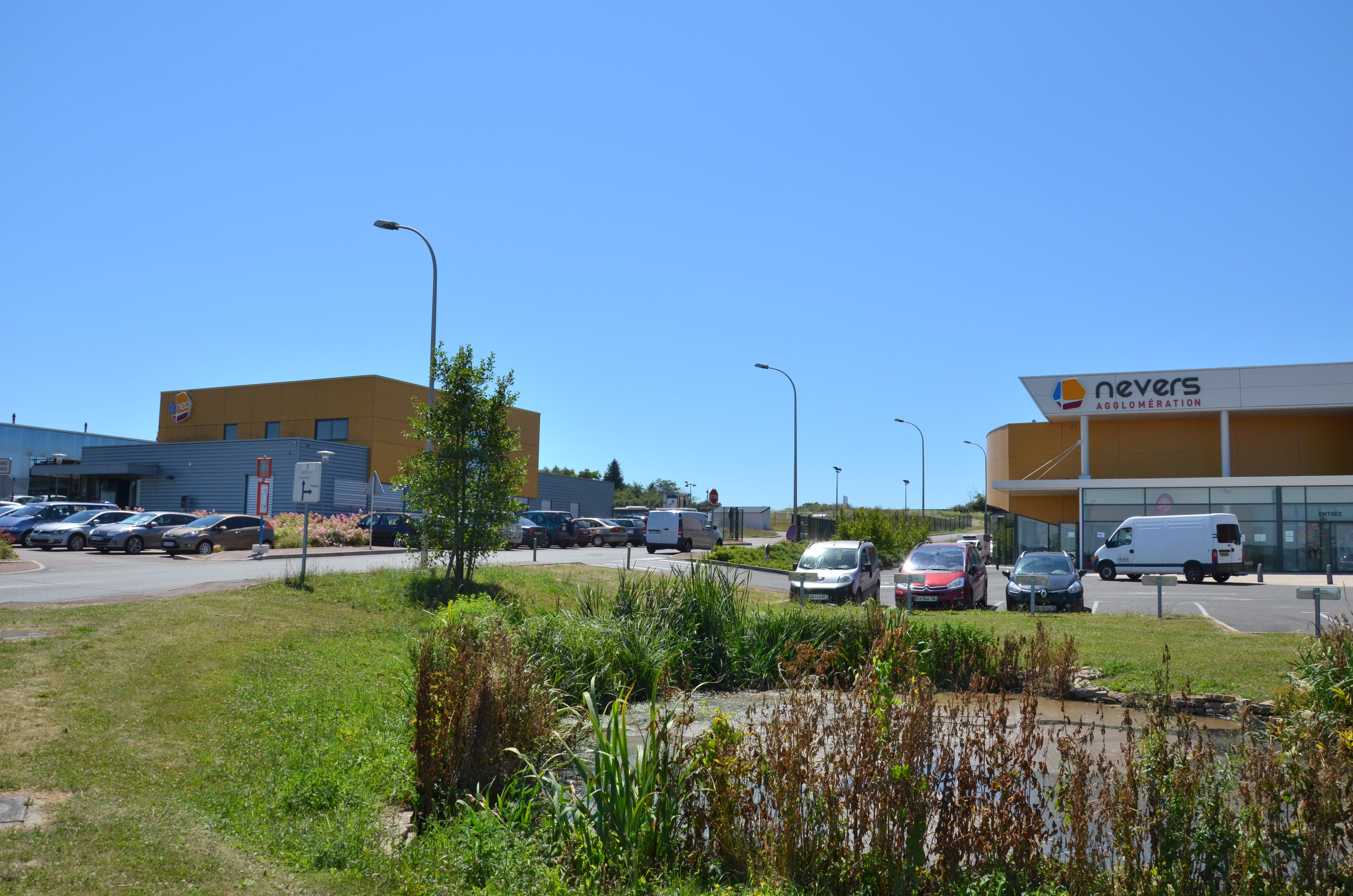 Proximité du dépôt Taneo avec le siège de l'agglomération de Nevers.